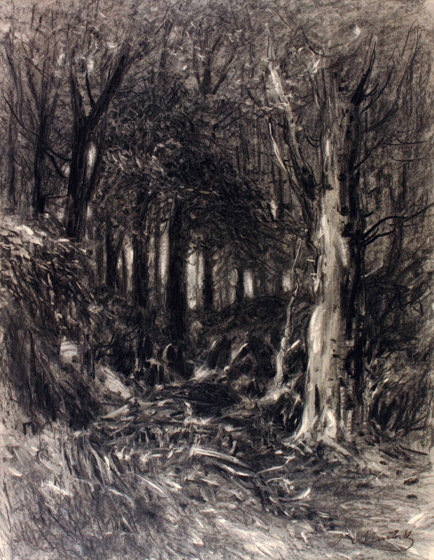 Lesní zátiší,sign. PD J. Mařák, lavírovaná kresba uhlem, karton, 61 x 47 cm, soukromá sbírka